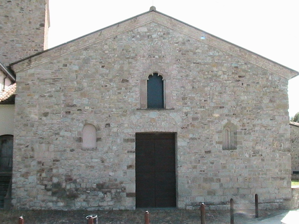 Bardone (Terenzo) - Pieve di Santa Maria Assunta